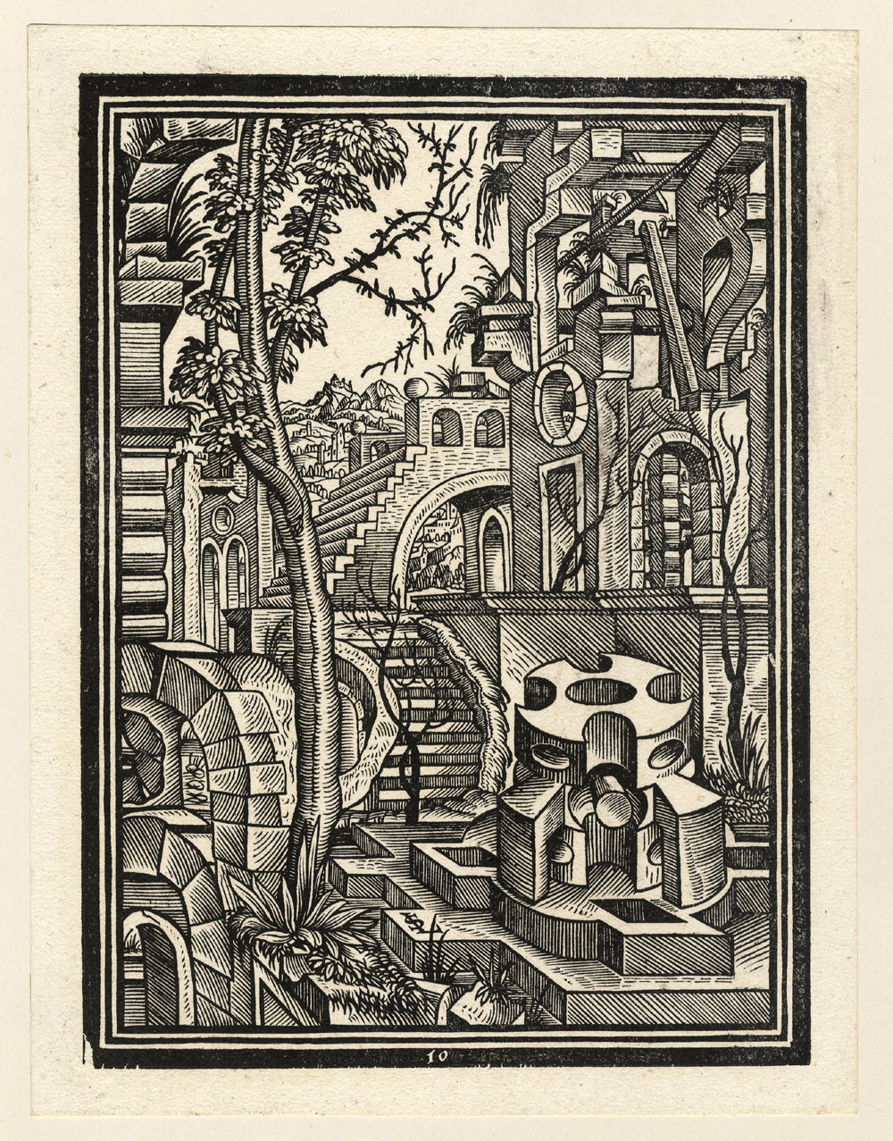 Blatt aus: Hierinn etliche zerbrochne Gebew, den Schreinern in eingelegter Arbait dienstlich, auch vil andern Liebhabern zu sondern gefallen geordnet unnd gestelt. Augsburg, Rogel, 1567